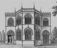 Gotisches Haus in Twickenham, Bauherr und Eigentümer ab 1753 war der britische Porträtmaler Thomas Hudson